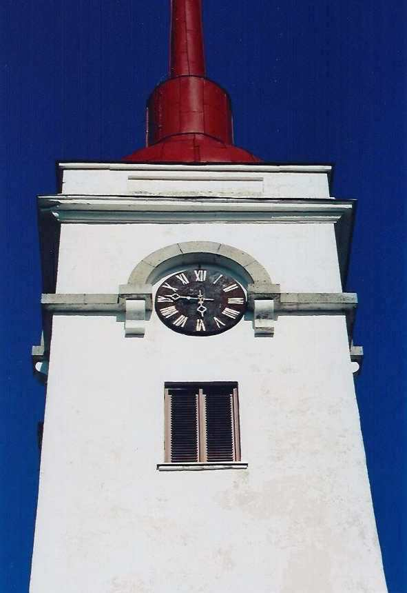 Evang.-luth. Laurentiuse Kirik (Laurentius-Kirche) in Kuressaare, Saaremaa (Ösel), Estland